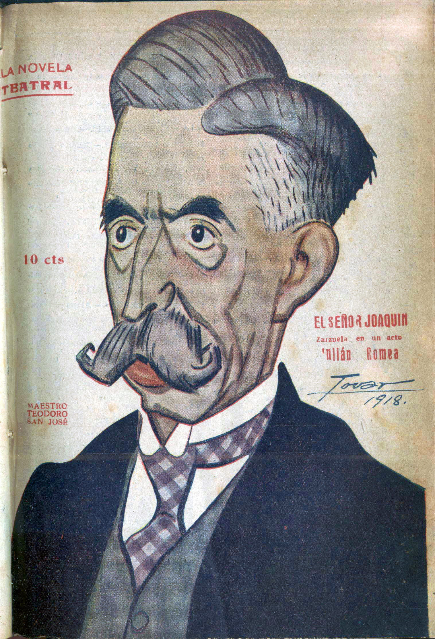 Caricatura del maestro Teodoro San José.